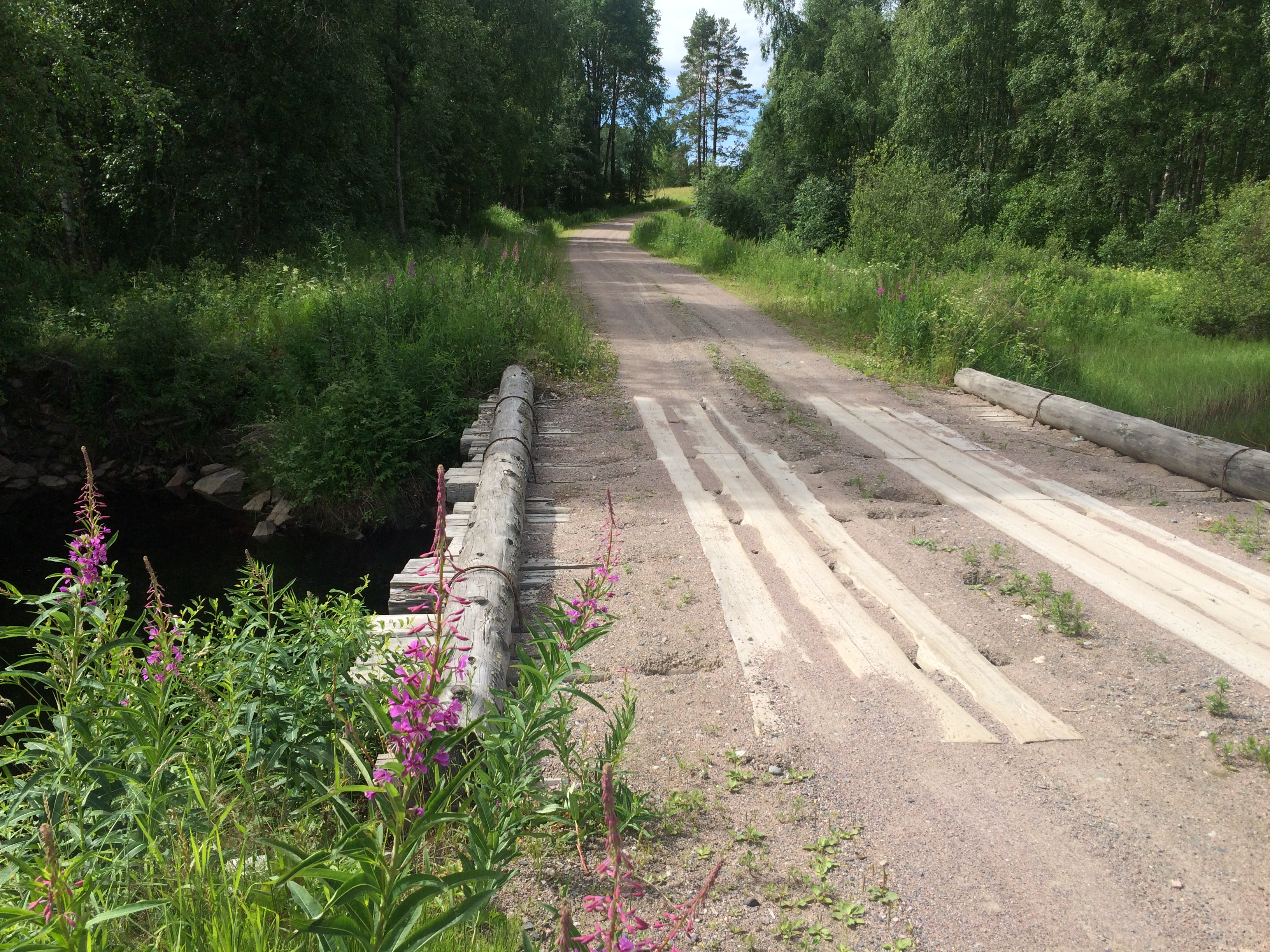 Соанйоки